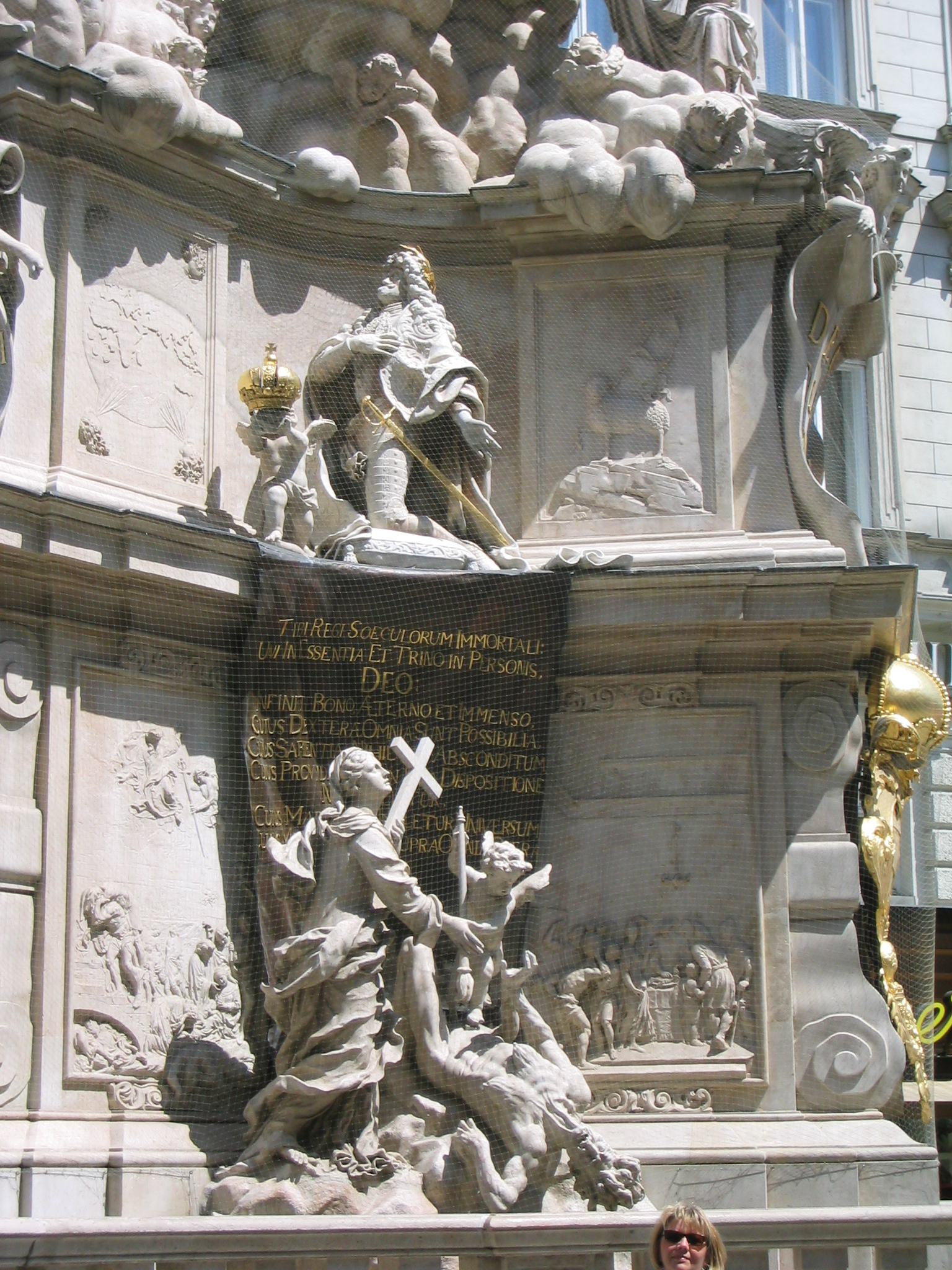 Detail der Wiener Pestsäule